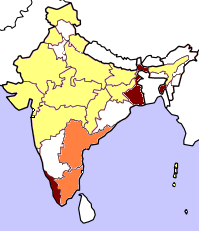 Kartan bygger på resultatet från valet till Lok Sabha april/maj 2004. Gult betyder att partiet lanserat en eller flera kandidater i delstaten, dock utan att vinna mandat. Orange betyder att partiet vunnit mandat från delstaten. Rött betyder att partiet vunnit minst 25% av mandaten från den delstaten och mörkrött 50% eller mer. Kartan tar inte hänsyn till avhopp, partifusioner och fyllnadsval under den ordinarie mandatperiodens gång. Gjord av Soman.